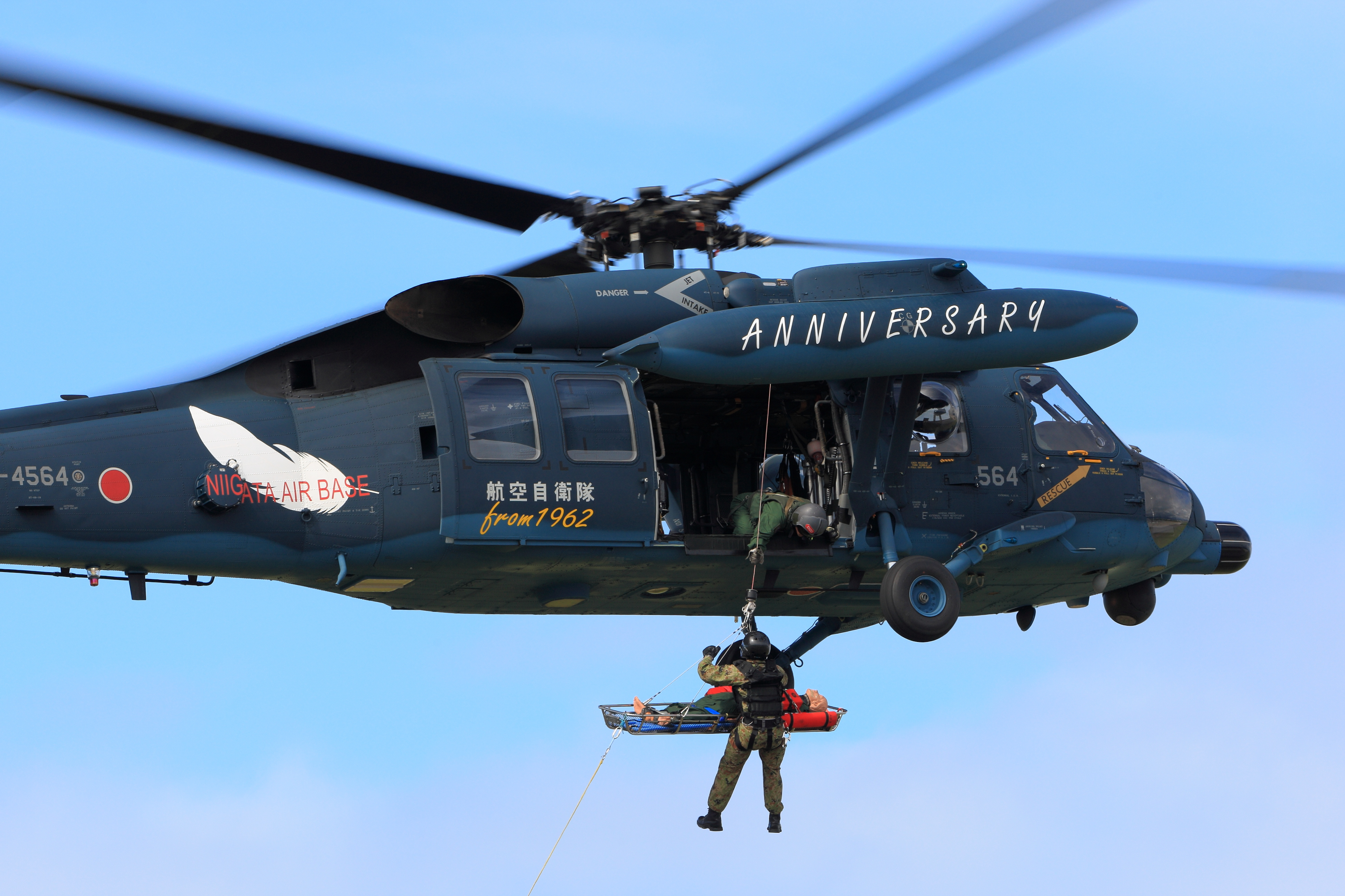 航空自衛隊新潟分屯基地創設50周年記念行事で救難飛行展示を行う､航空自衛隊新潟救難隊のUH-60J 新潟分屯基地創設５０周年記念塗装機